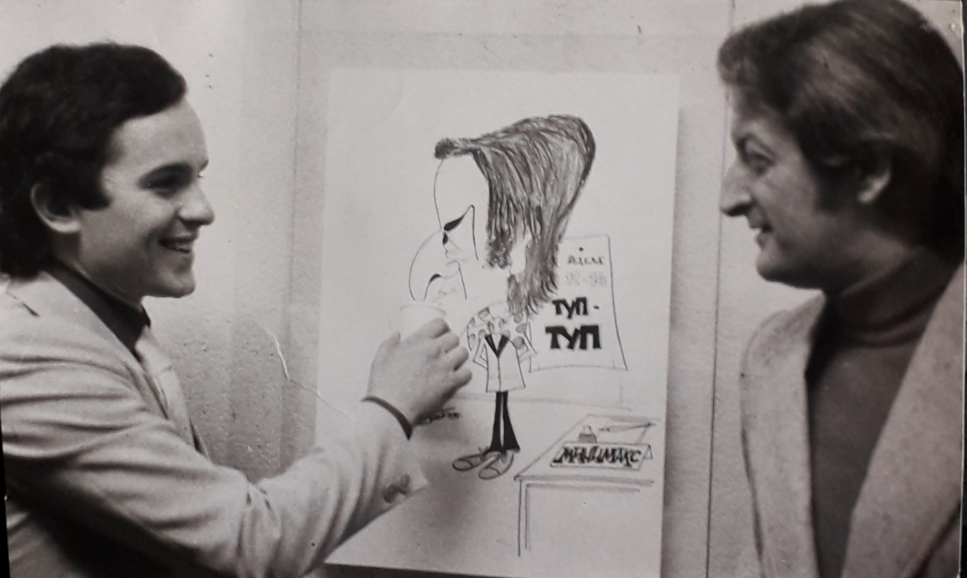 У друштву са Милованом Илићем Минимаксом, приликом отварања изложбе у Београду 1975. године.Фото: Драган Биббић (по одобрењу).